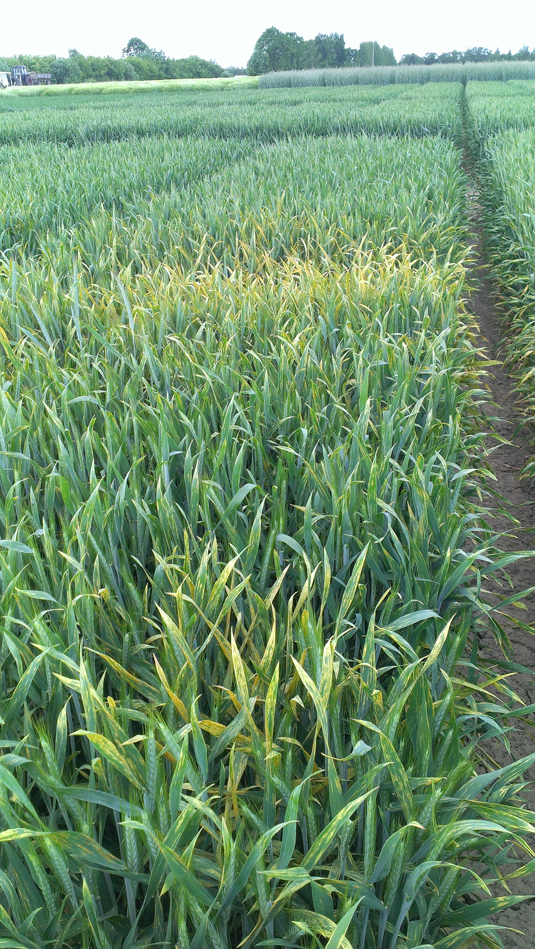 Dzeltenās rūsas izplatība ziemas tritikāles sējumā, LAAPC lauka izmēģinājums MPS "Pēterlauki".